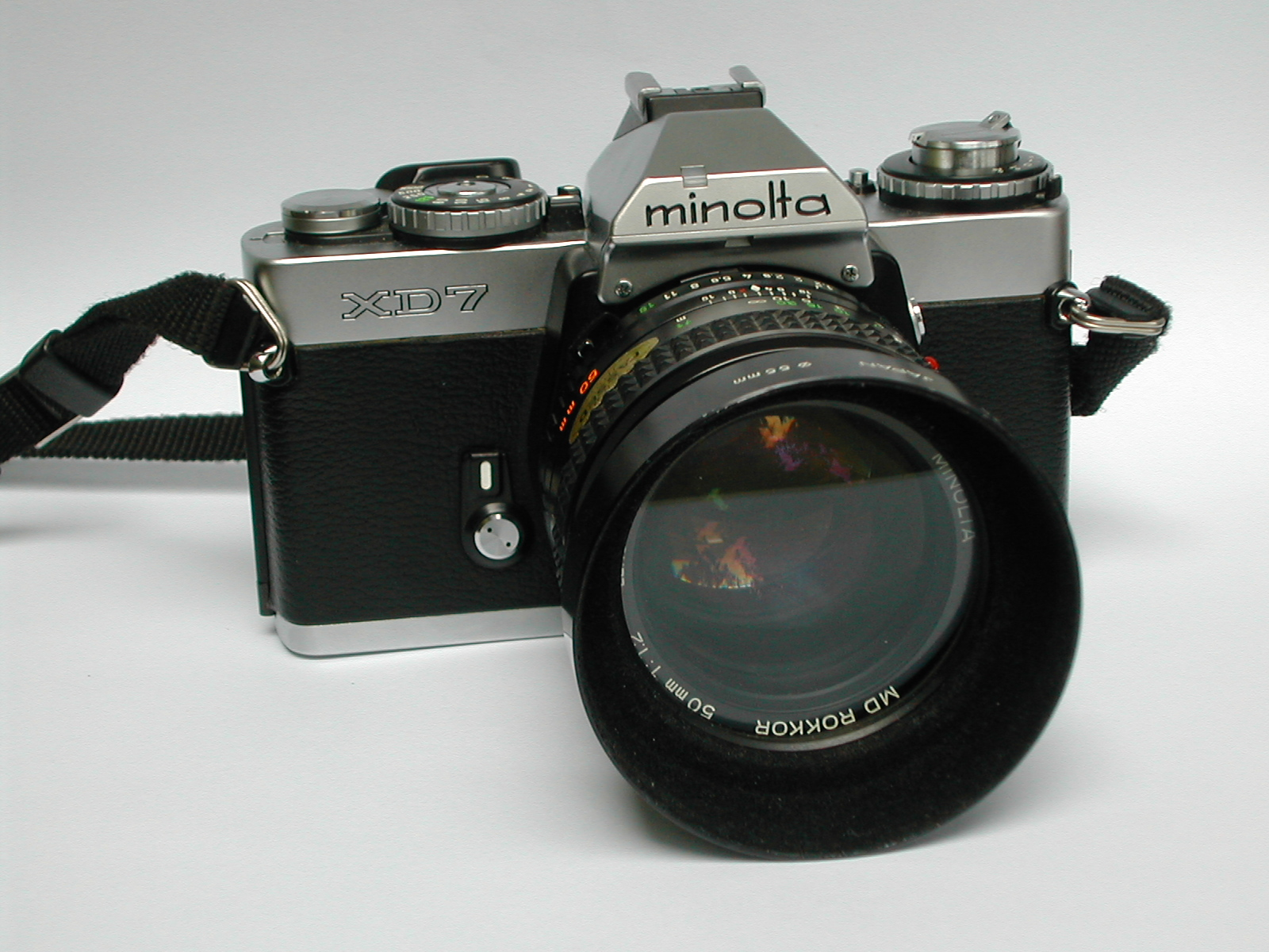 Bild einer Minolta XD7 mit MD Rokkor 50 mm 1:1,2, Filter und Sonnenblende Quick & dirty aufgenommen mit Stativ, Selbstauslöser und meiner alten Nikon E 775 --Lennex 17:01, 4. Jul 2006 (CEST)